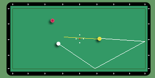 tiro biliardo garuffa